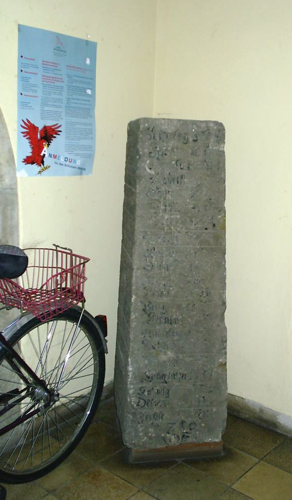 Postmeilensäule Niemegk (Relikt)